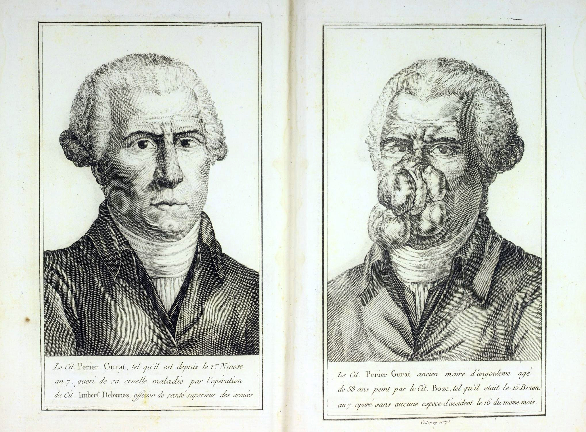 Ablation d'une "tumeur éléphantiasique du nez". Illustration des Nouvelles considérations sur le cautère actuel d'Imbert de Lonnes.